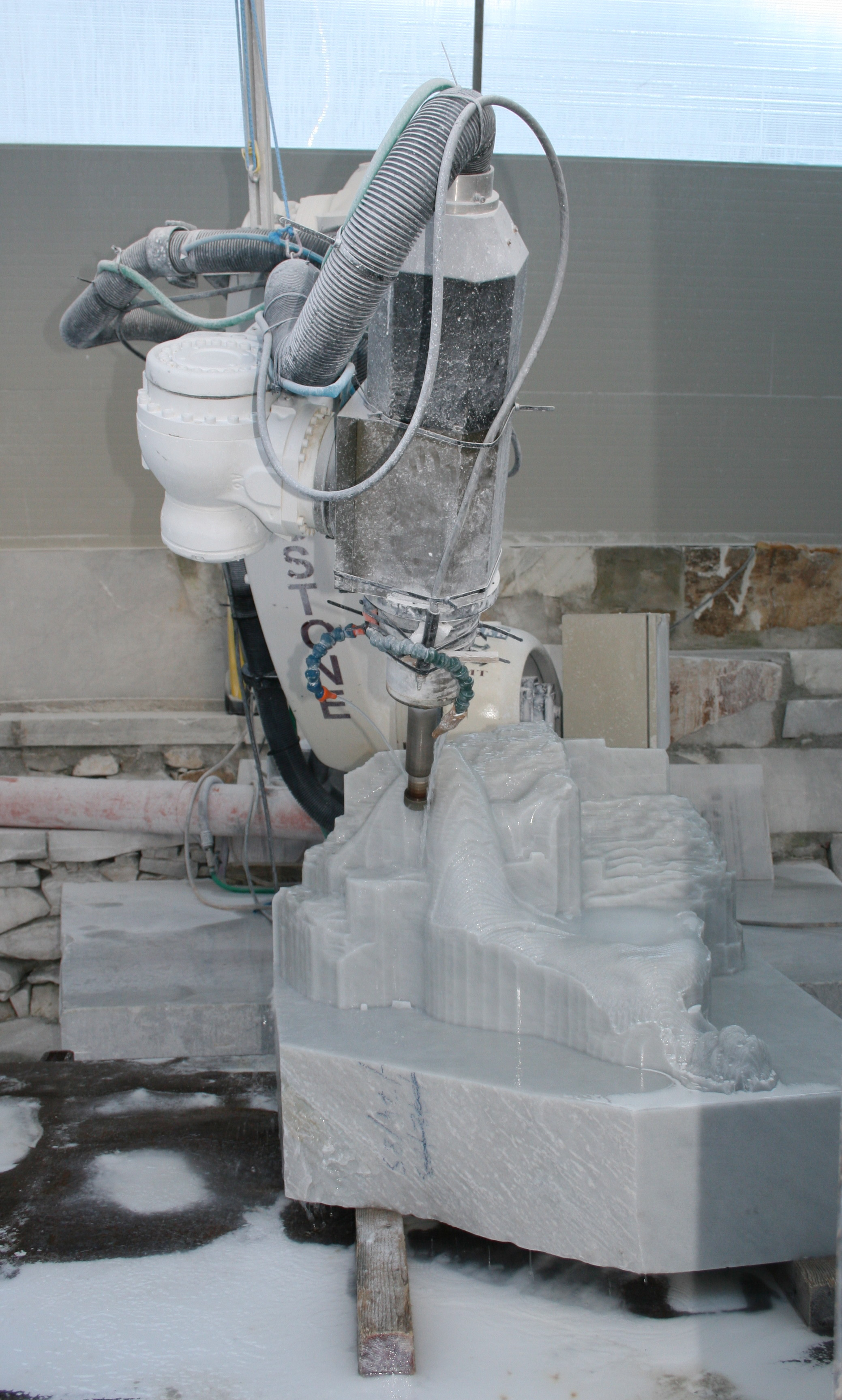 Kopierfräser für plastische Steinarbeit